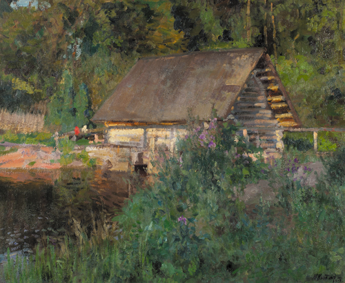 ЛЕТО (1913) Картон / масло 59 x 70 см Подпись и дата справа внизу «Н. Клодтъ 1913»